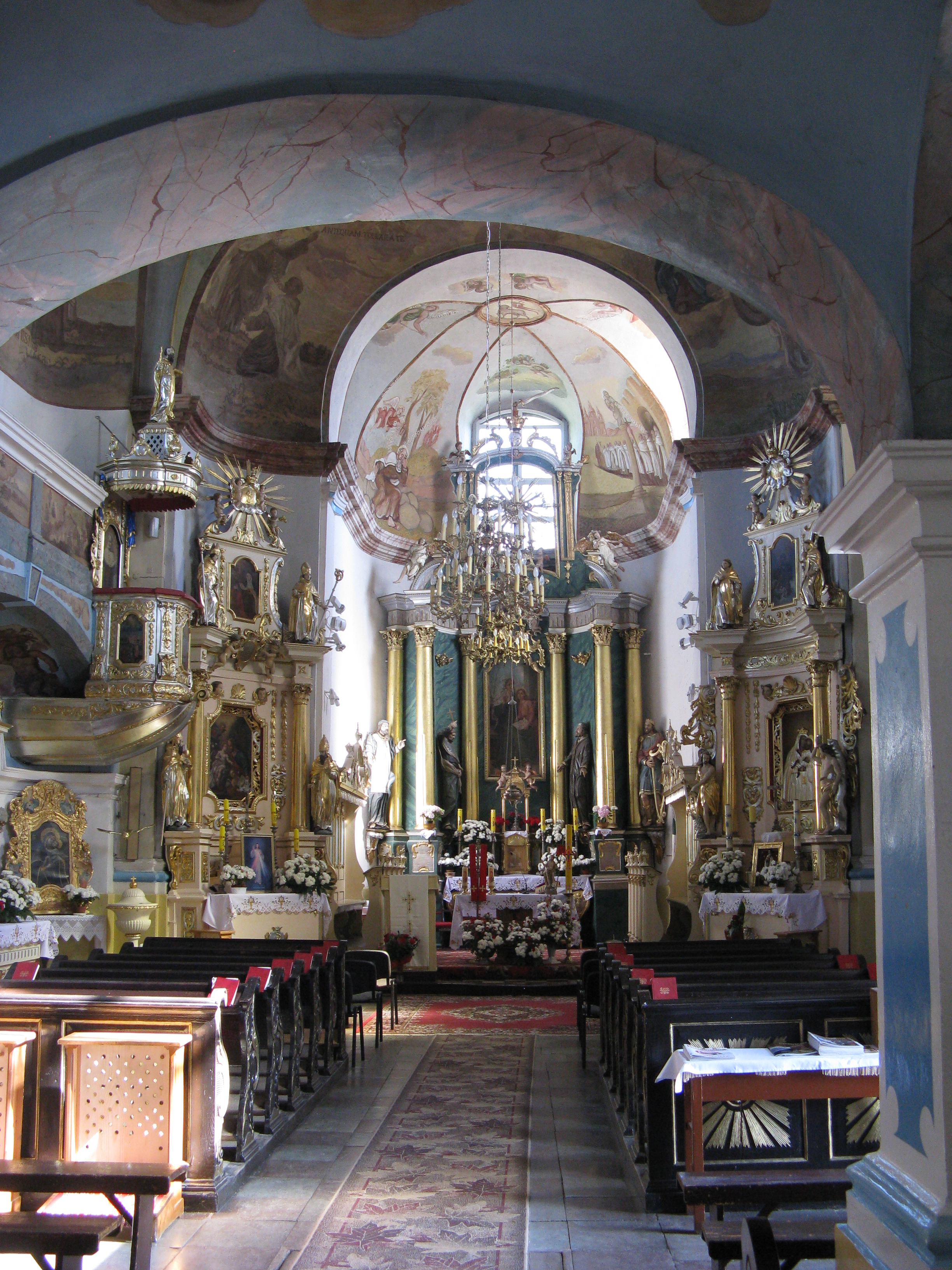 kościół p.w. św. Anny w Trutowie, Gmina Kikół